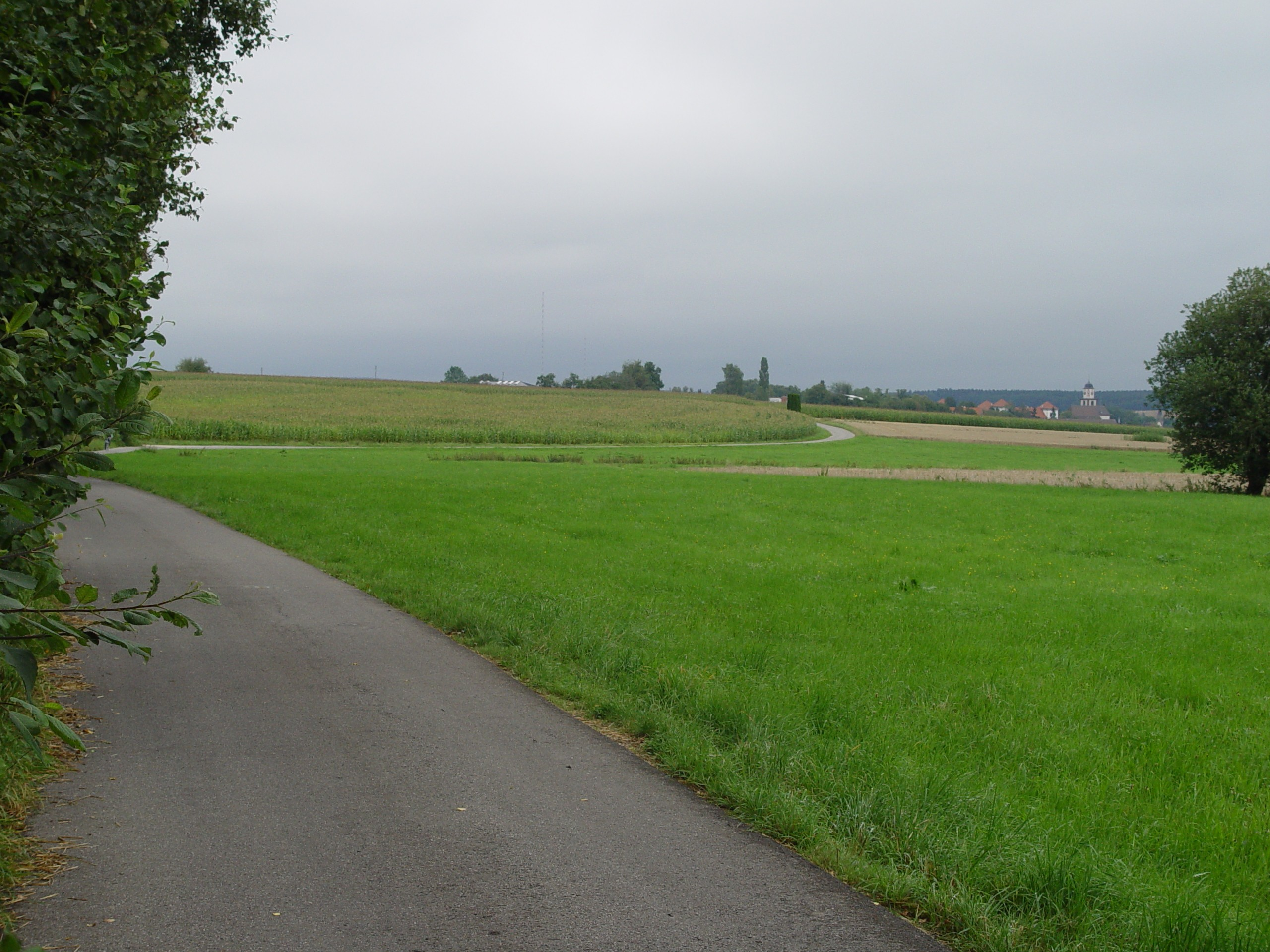 Am Feldweg, Meßkirch, Baden-Württemberg (Heidegger's field path he often used to promenade) - (le "chemin à travers champs" (le "Feldweg") ou il se promenait pendant qu'il avait ses idees philosophiques) - (ハイデッガーの散歩)